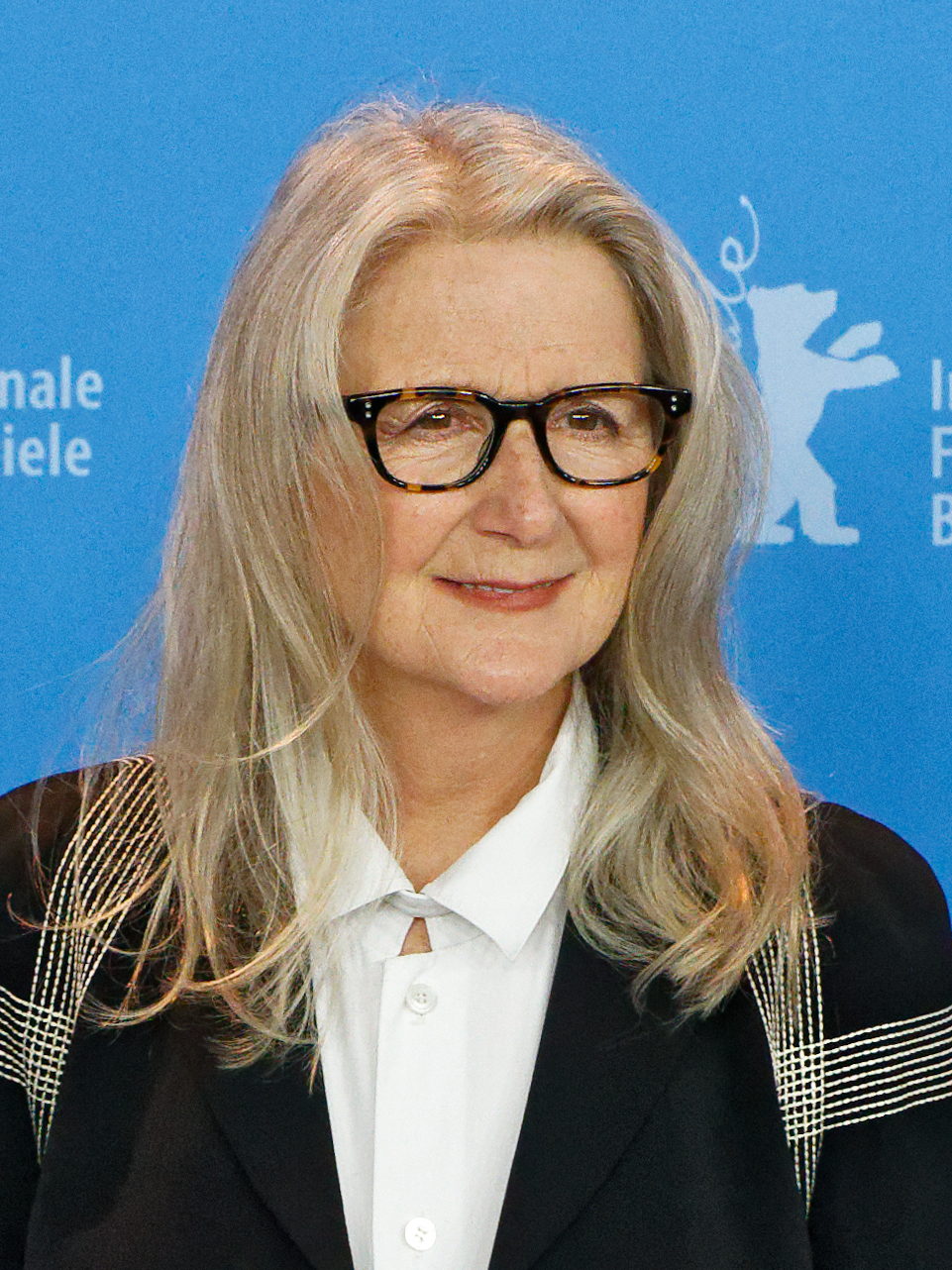 Sally Potter beim Photo Call zu The Party bei der Berlinale 2017